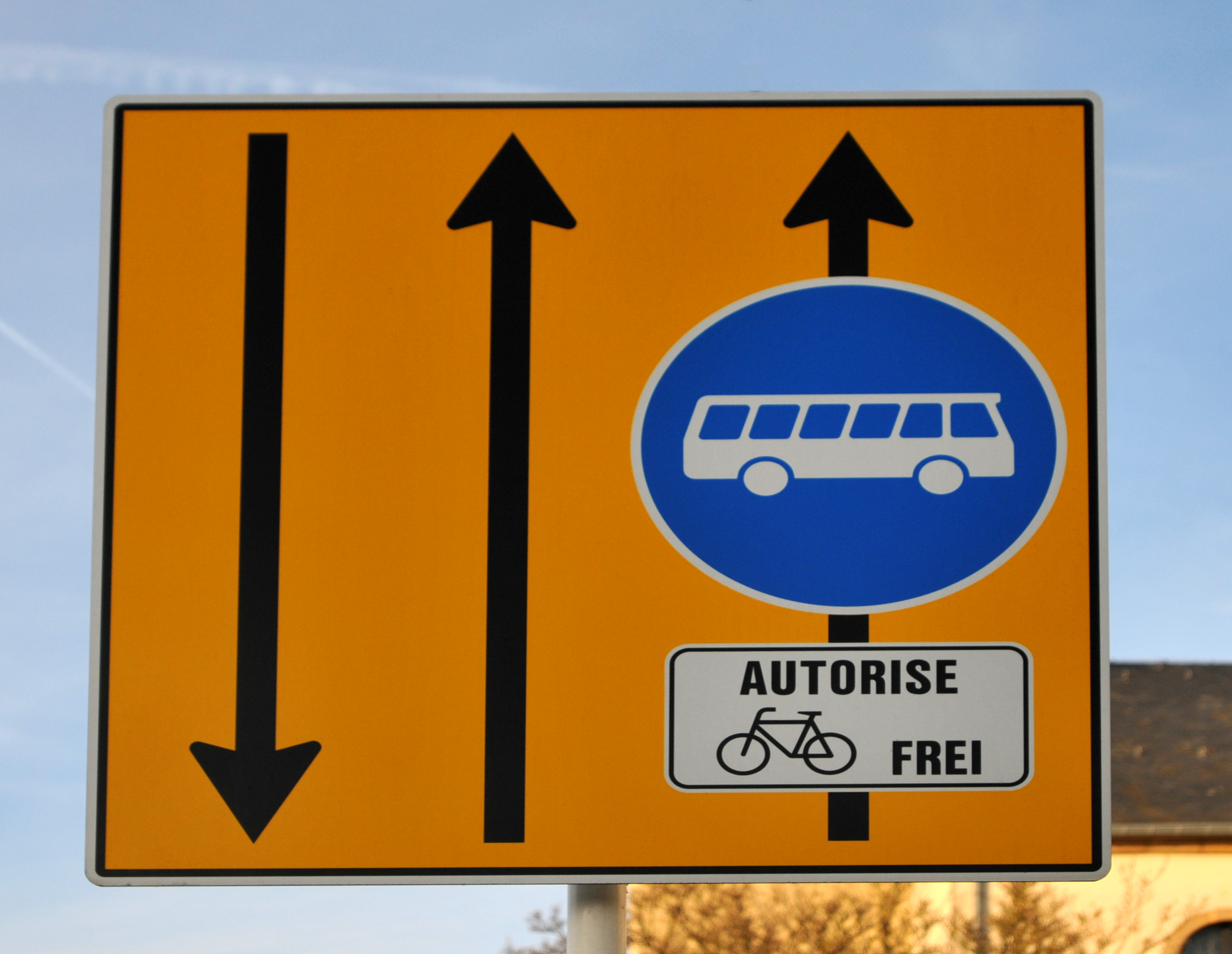 Verkéiersschëlter zu Alzeng.